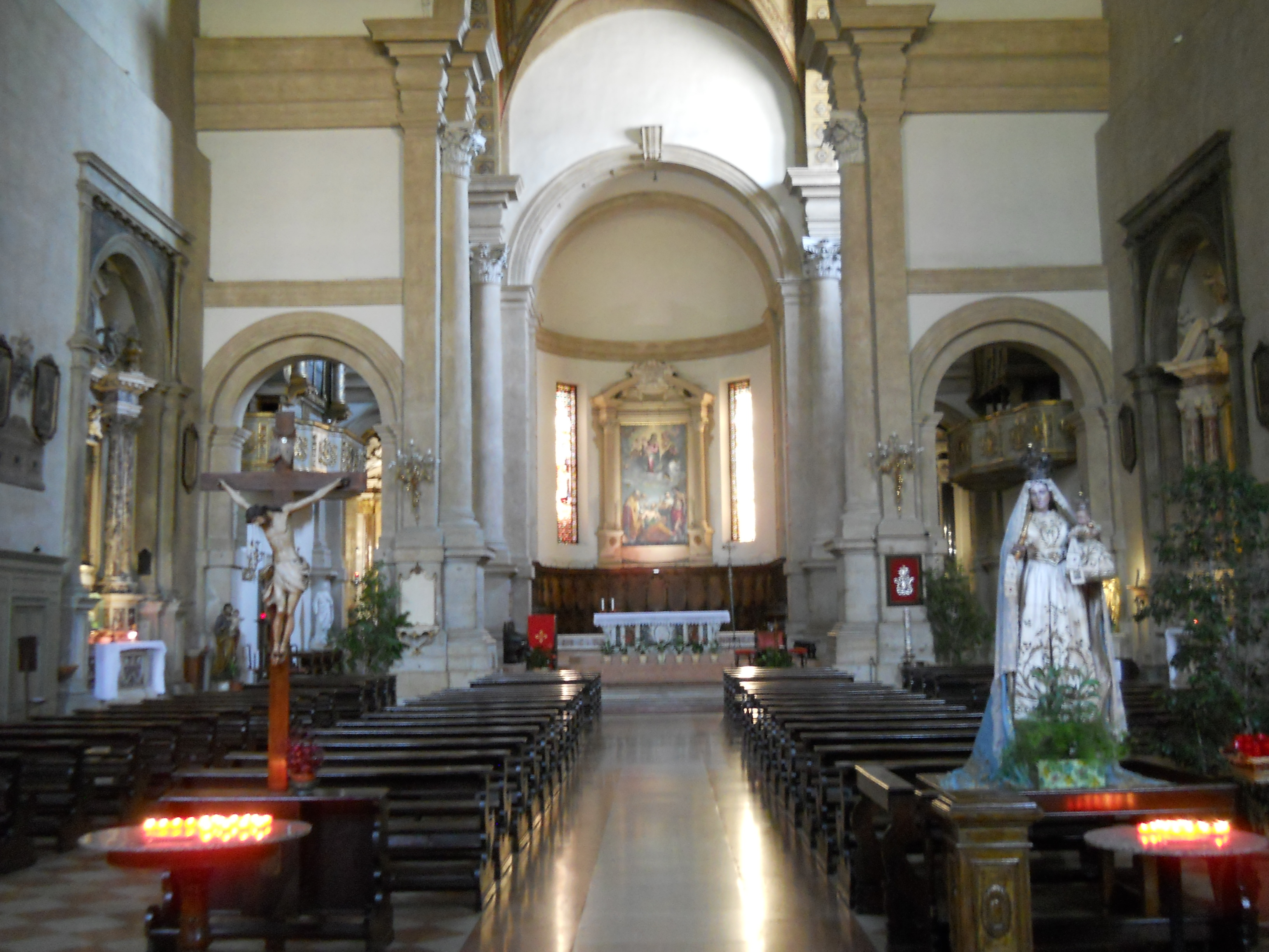 Interno della Chiesa di San Tomaso Cantuariense a Verona